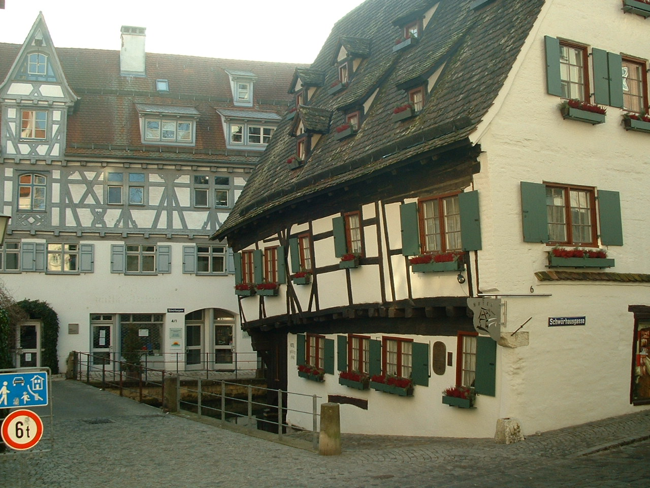 Die Ulmer Münz (im Hintergrund querstehend) im Fischerviertel, rechts: Das Schiefe Haus (Hotel)